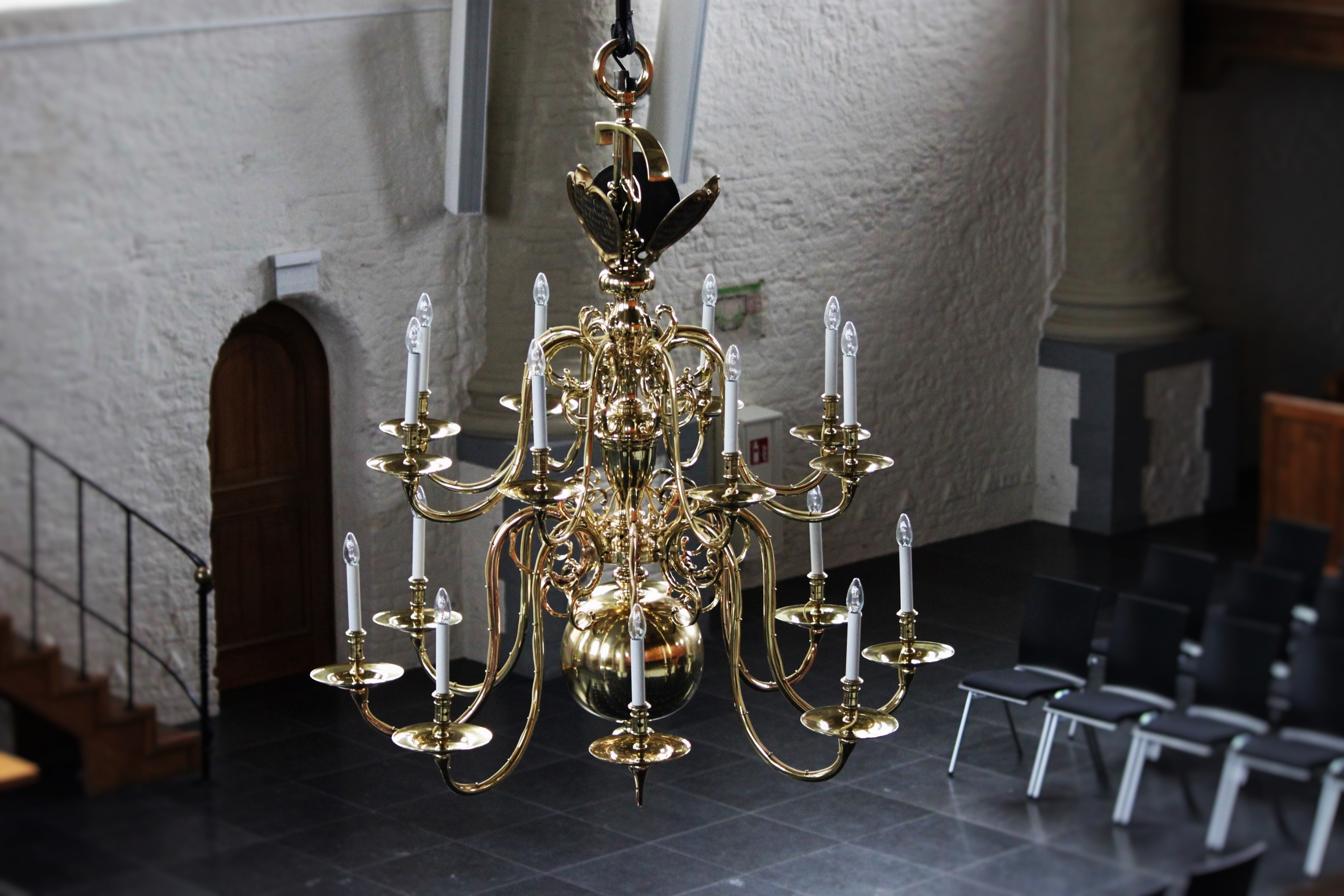 Neue Kirche in Emden, Ostfriesland, Niedersachsen, Deutschland